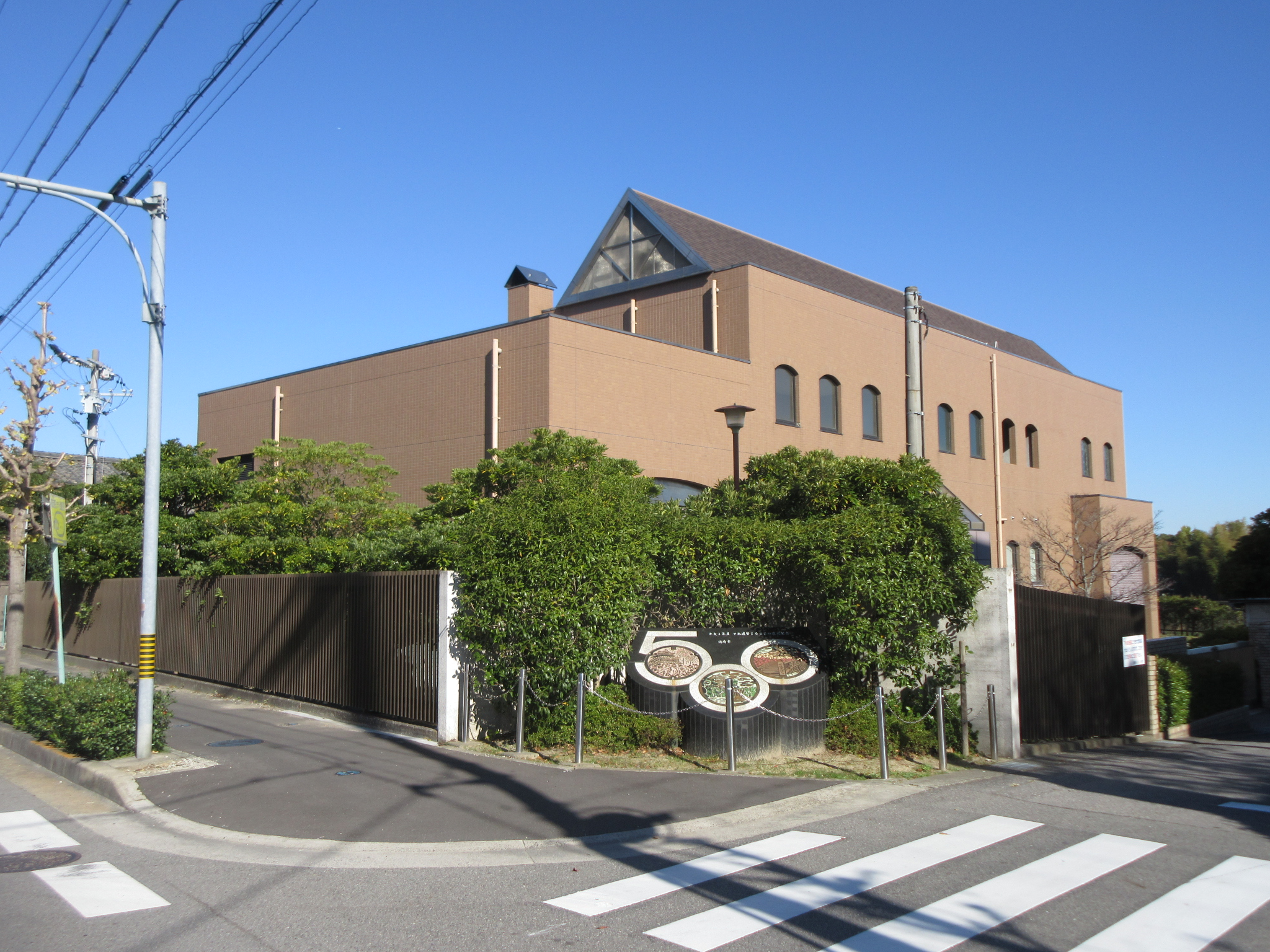 吹矢中継ポンプ場（岡崎市東明大寺町）